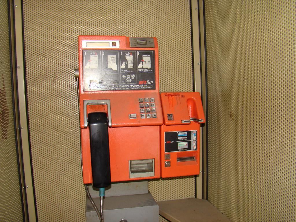 Telefono pubblico Rotor Urmet